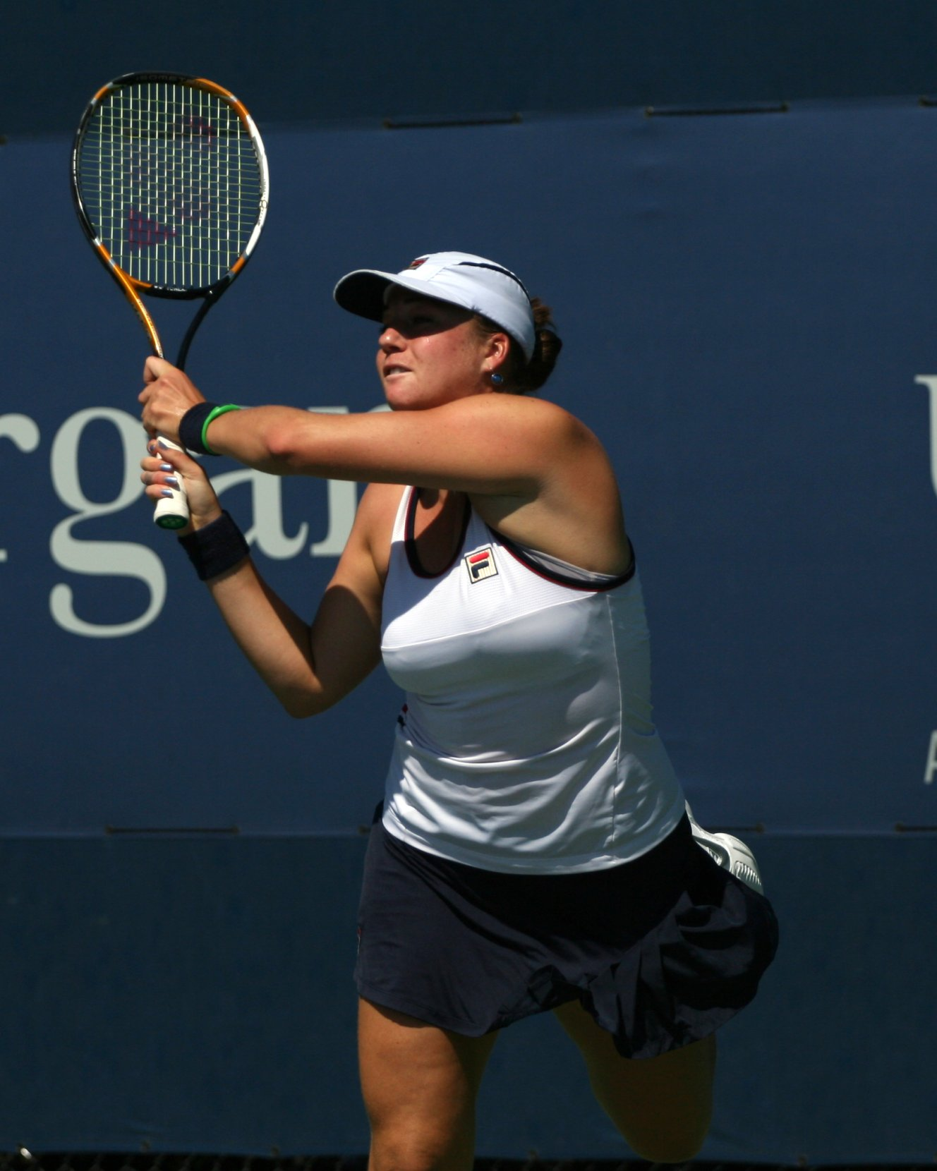 U.S. Open Aug. 30, 2010